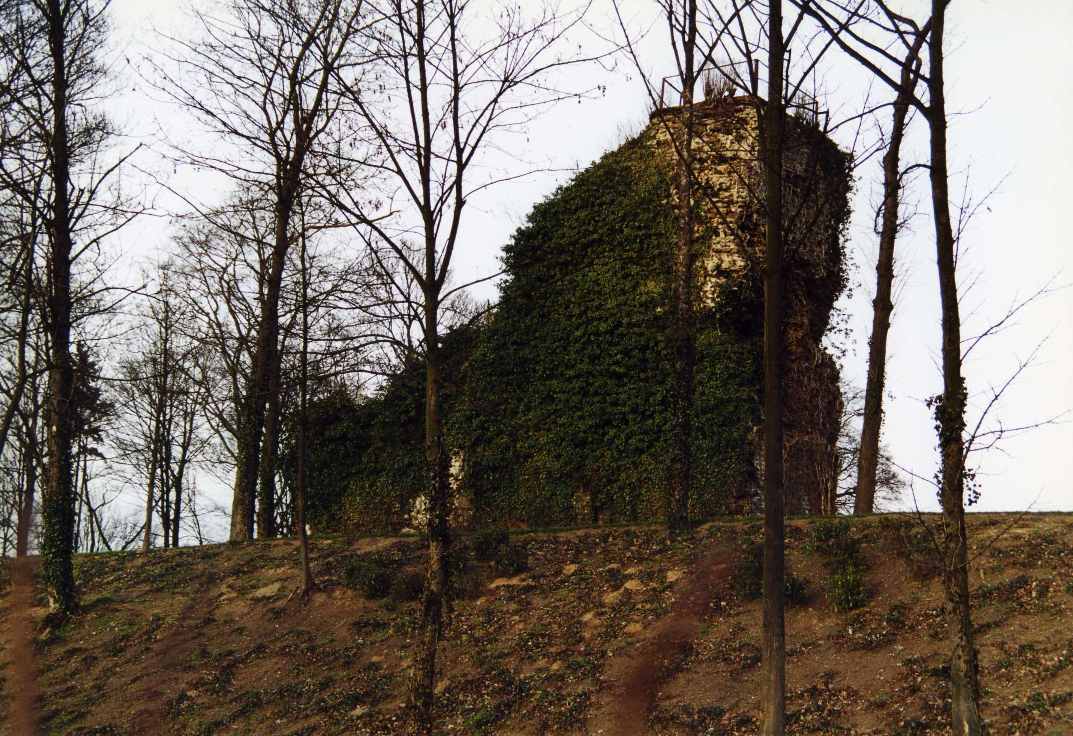 Restant van kasteel Oudenborg te Merum.